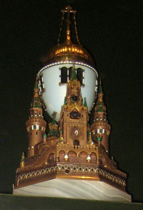 Московский Кремль. Фаберже